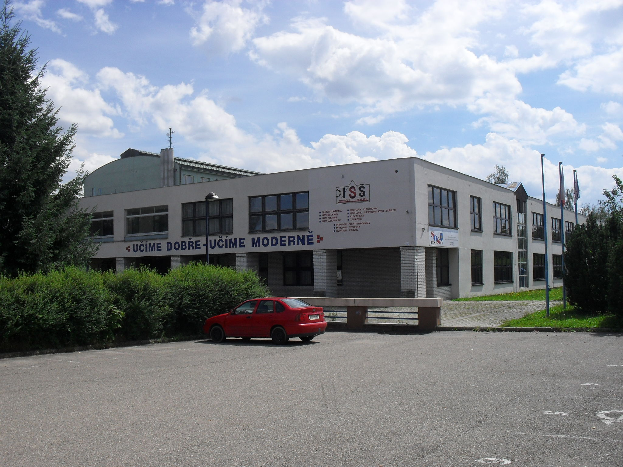 Integrovaná střední škola technická (ISŠT) Černoleská, Benešov